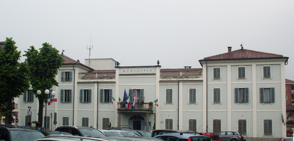 facciata principale